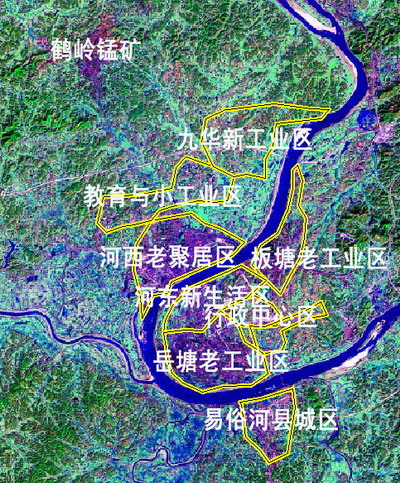 湘潭功能分区